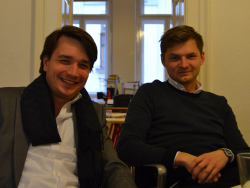 Architekti Ondřej Chybík a Michal Krištof